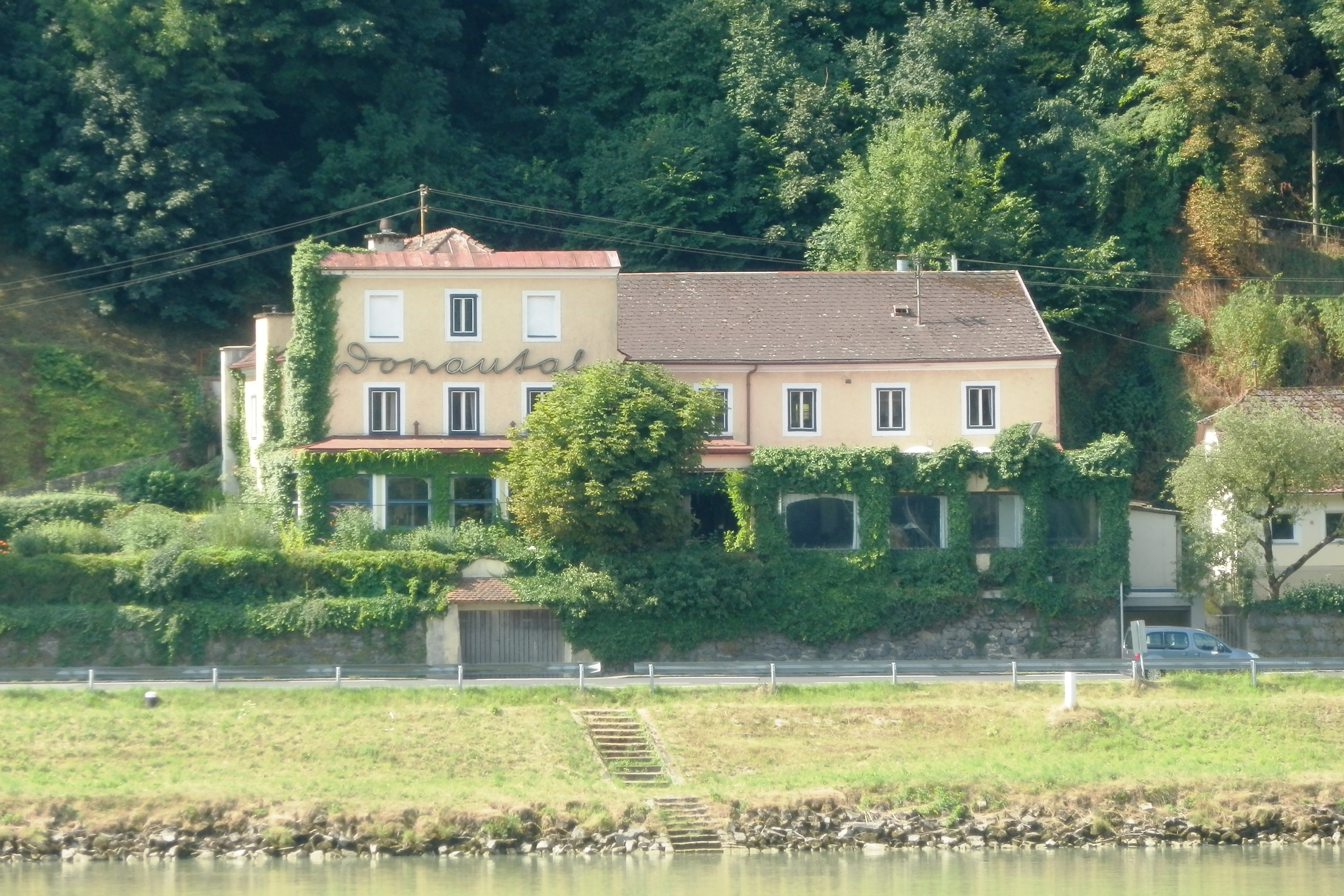 Ehem. Gasthaus Donautal, Linz, Obere Donaulände